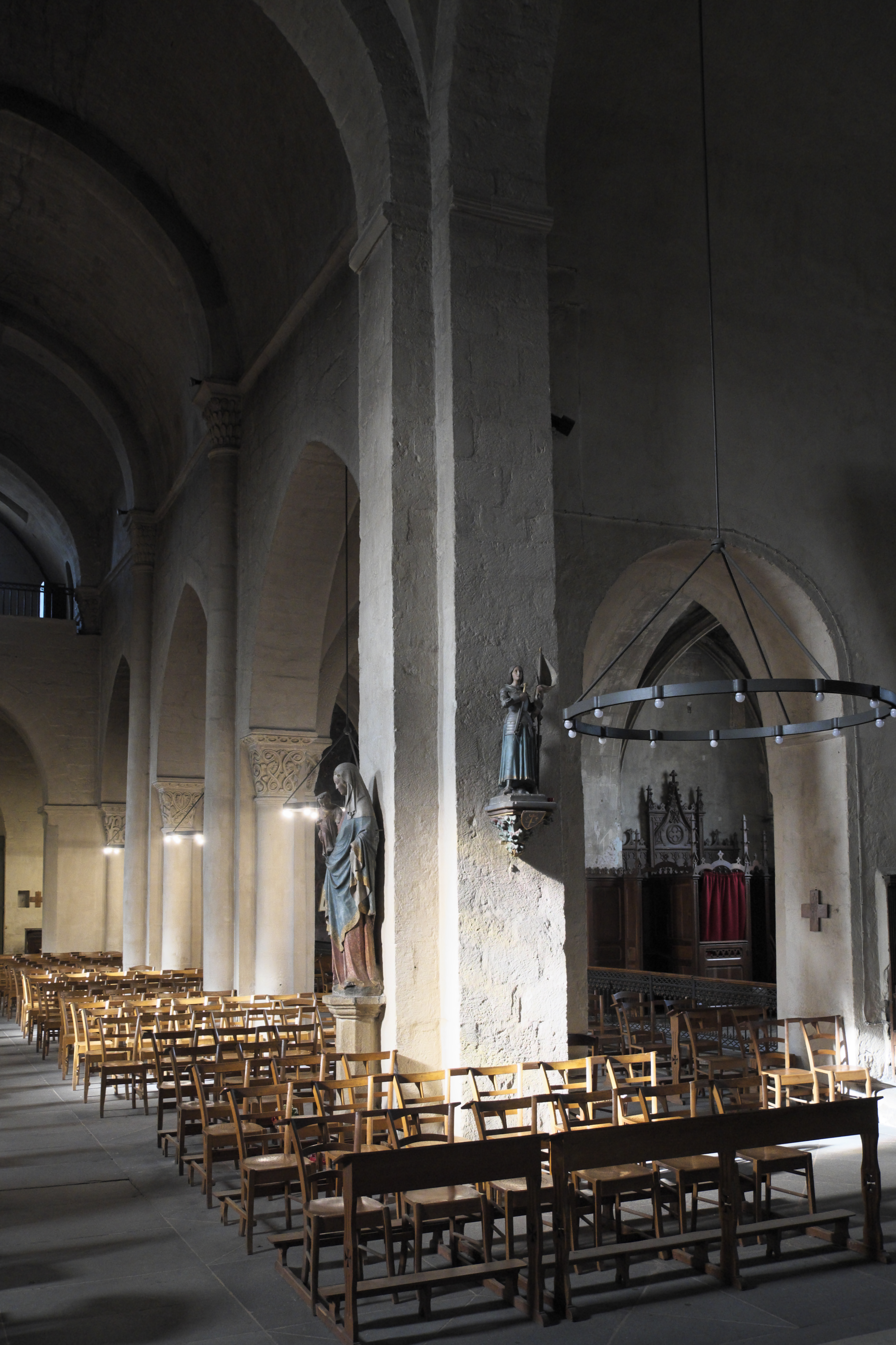 Katholische Kirche Saint-Pierre in Yzeure im Département Allier (Auvergne-Rhône-Alpes/Frankreich), Innenraum